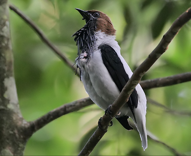 Procnias averano à Trinité-et-Tobago (Venezuela)